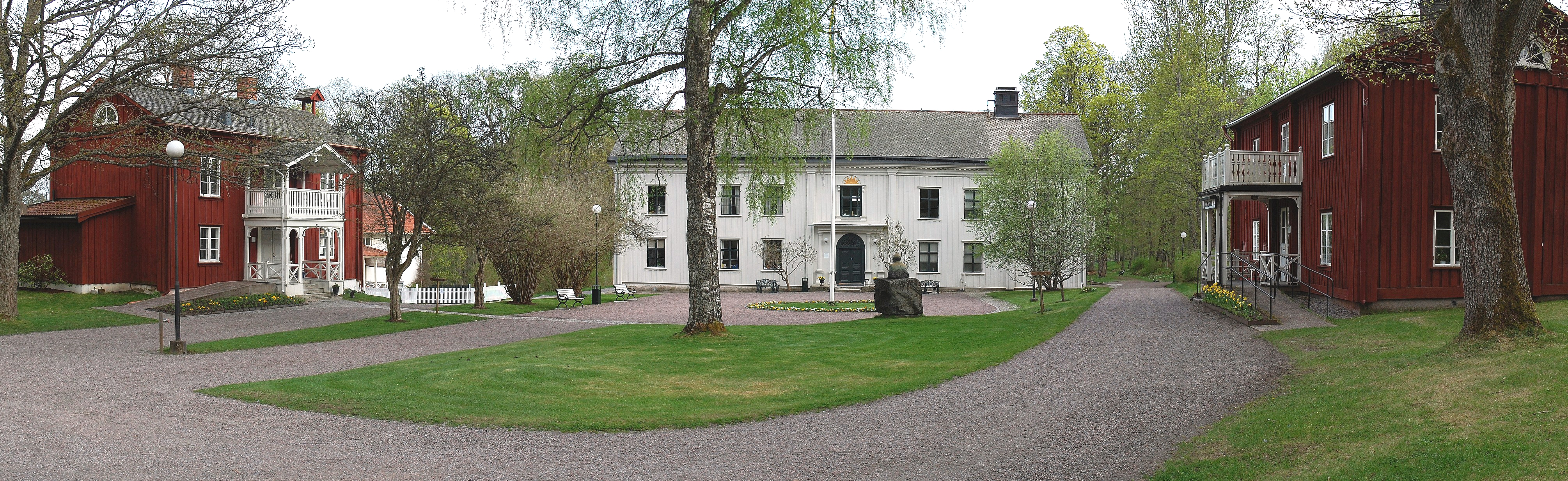 Das Herrenhaus Alster